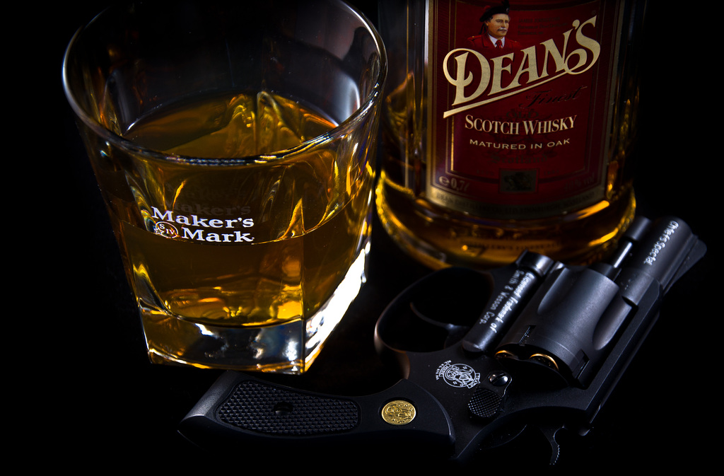 Fotos von Mecklenburg-Vorpommern